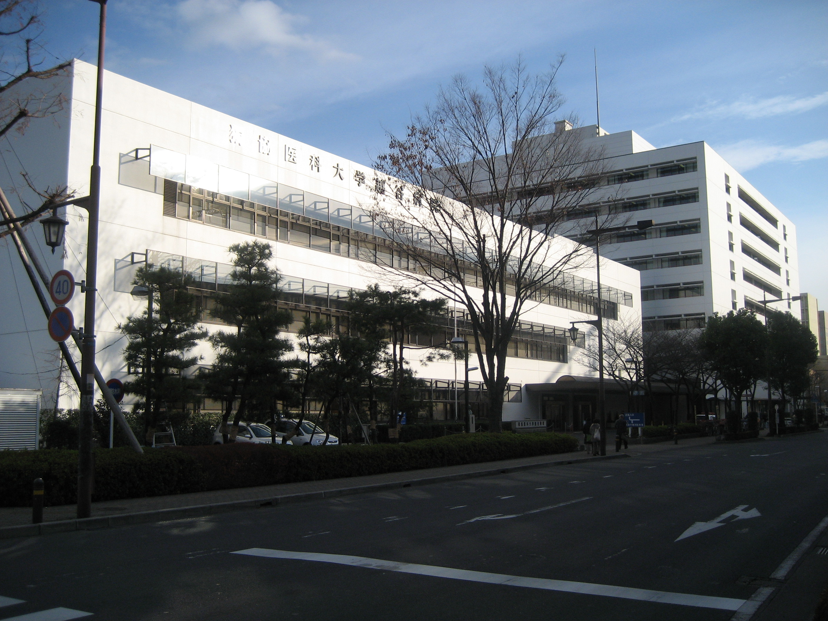 独協医科大学越谷病院２